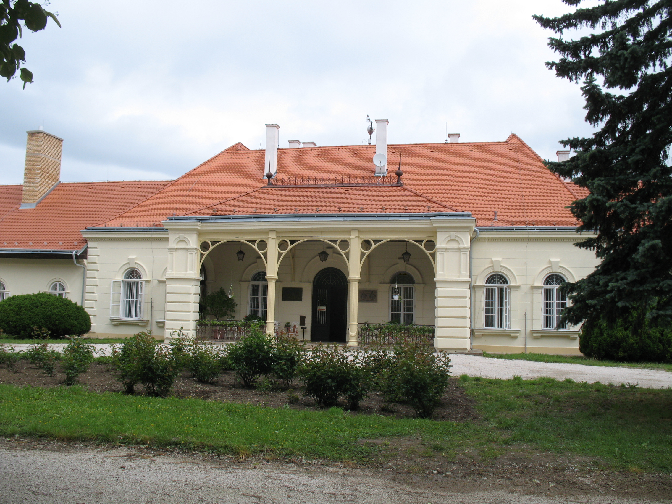 Kocsóc kastély